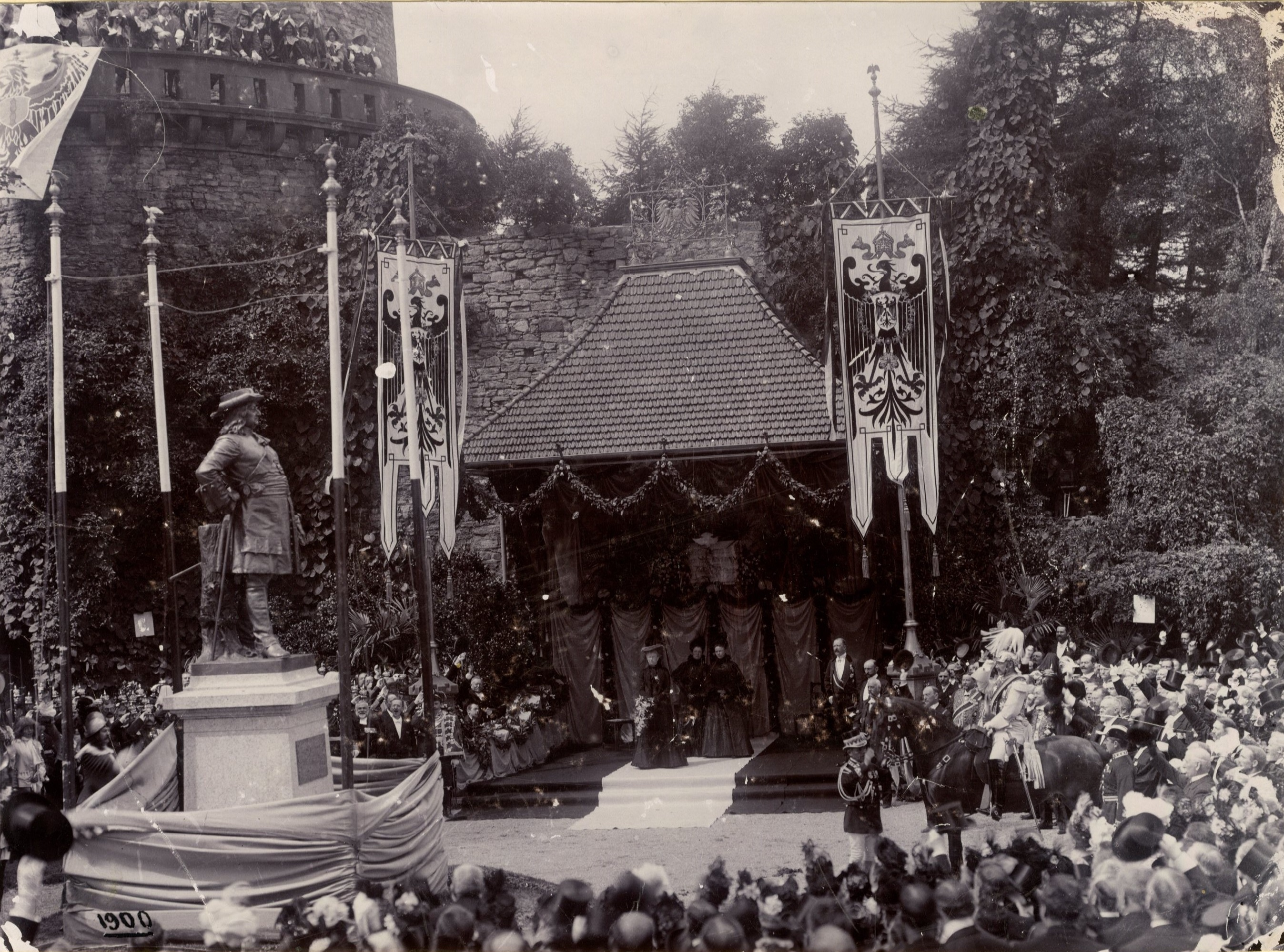 Enthüllung des Denkmals "Der Große Kurfürst" am 06.08.1900 auf der Sparrenburg in Bielefeld mit Kaiser Wilhelm II.